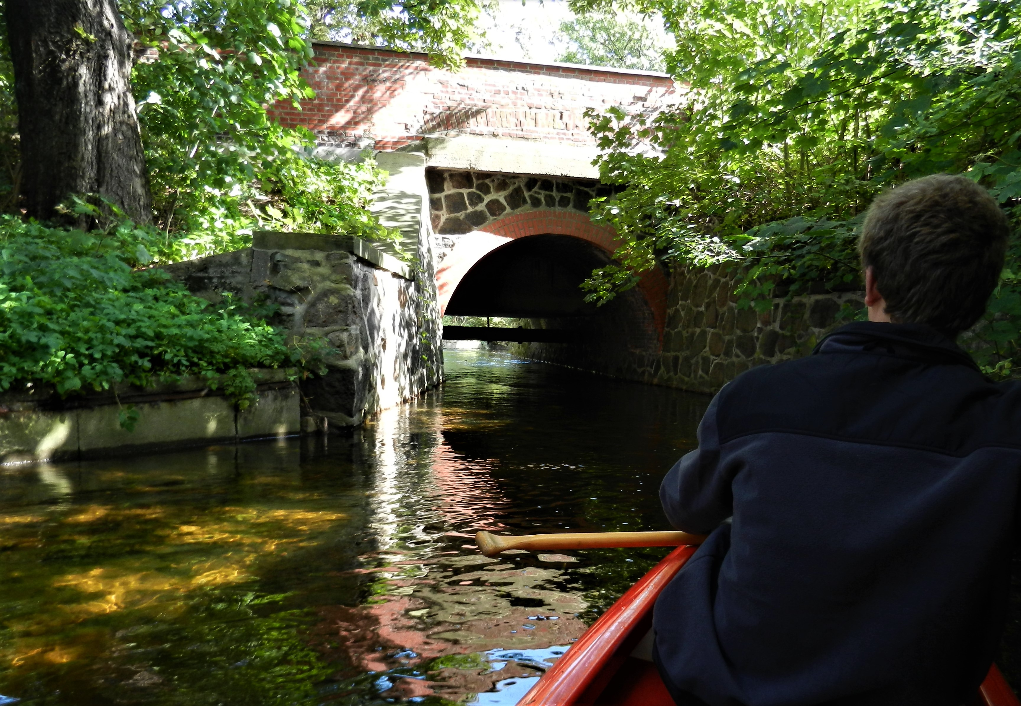 Aubachbrücke Wismarsche Straße Schwerin 2011